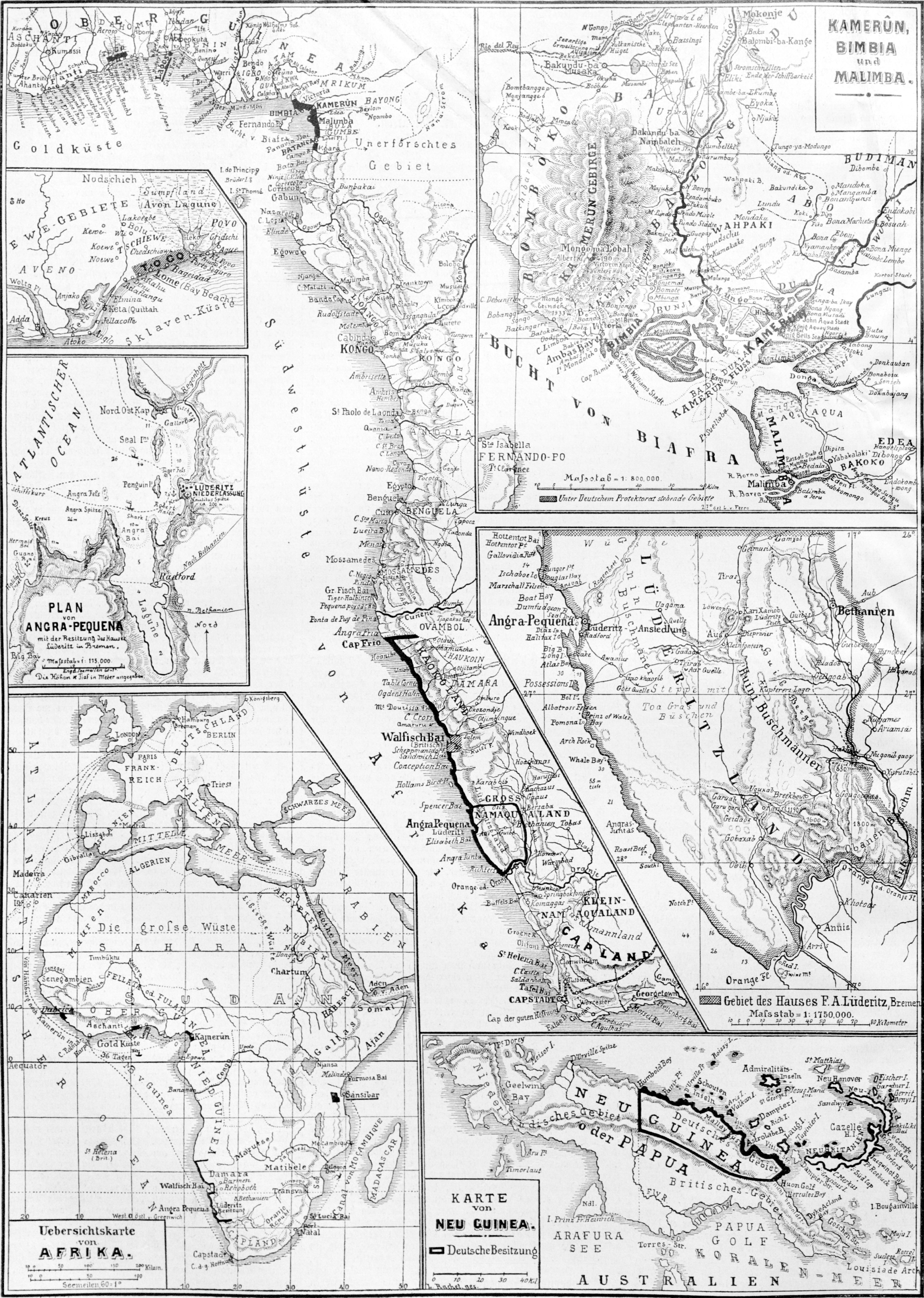 Karte der Deutschen Kolonien in Afrika und Papua Neuguinea um 1885.